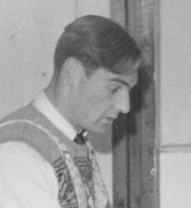 Nationaal Archief Beschrijving: Voetballer André Roosenburg in Florence. Datum: 14 april 1953 Vervaardiger: Presser Bestanddeelnummer: 905-6634 URL: [1] Voor meer informatie over het Nationaal Archief: Voor meer foto's uit deze en andere collecties, bezoek onze Beeldbank:, U kunt ons helpen onze kennis van de fotocollecties te verrijken door tags en commentaren toe te voegen. Herkent u mensen of locaties of heeft u een bijzonder verhaal te vertellen bij één van de foto's, laat dan een reactie achter (als u ingelogd bent bij Flickr) of stuur een mailtje naar